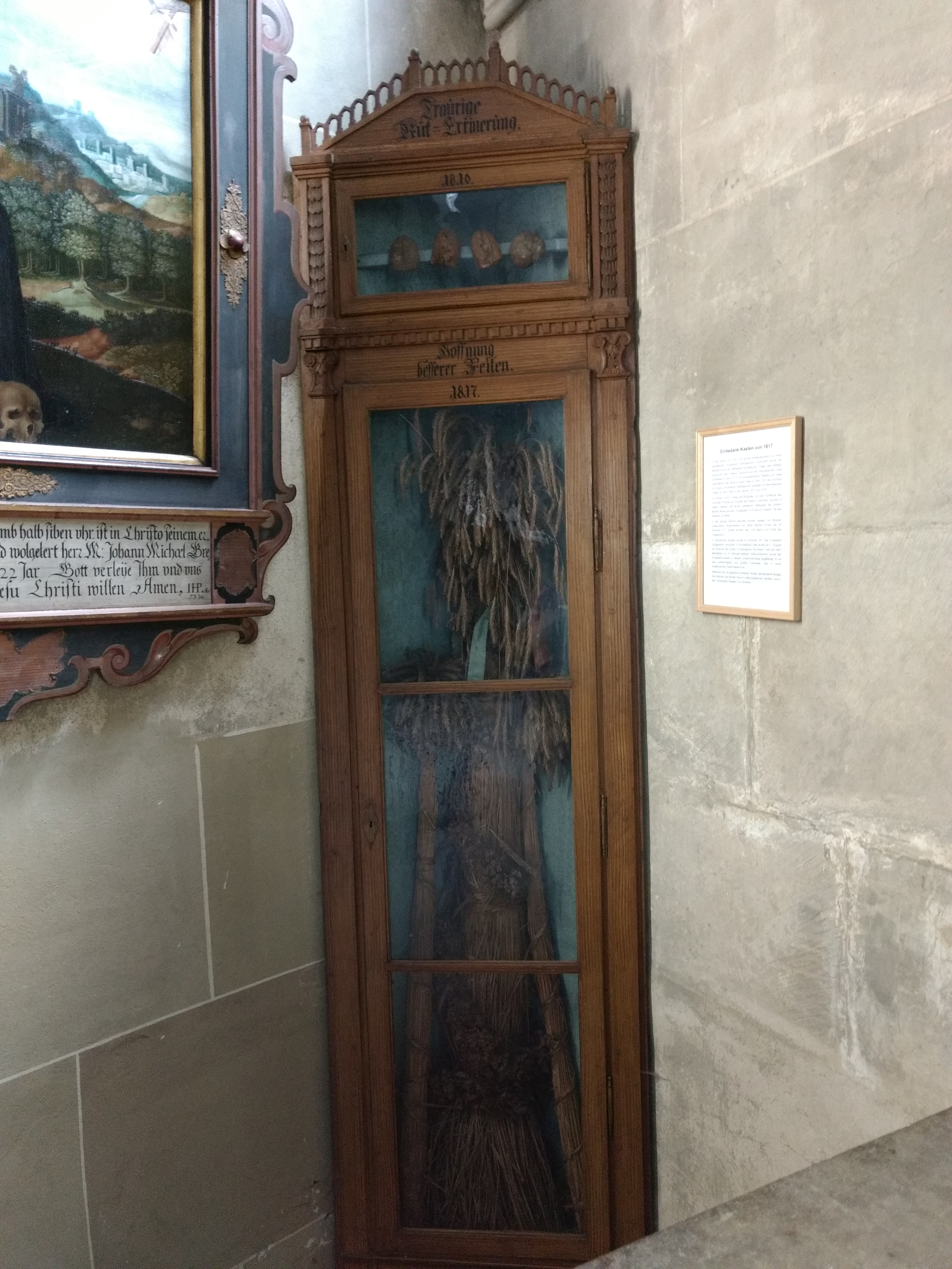 Schwäbisch Hall, St. Michael, Chor, Gedenken an das Jahr 1817 (nach dem Hungerjahr 1817)